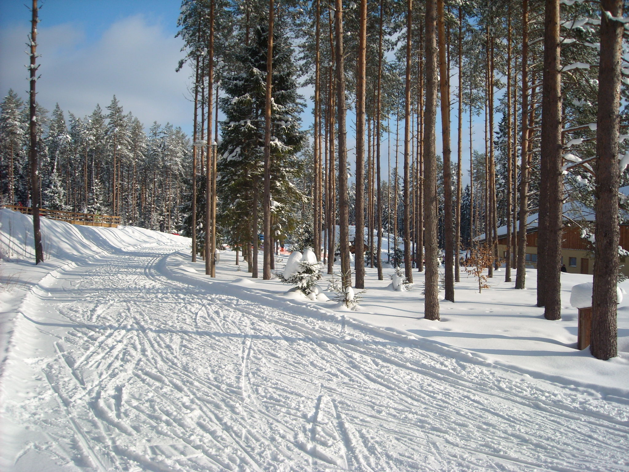 Suusarada Valgehobusemäe suusakeskuse juures